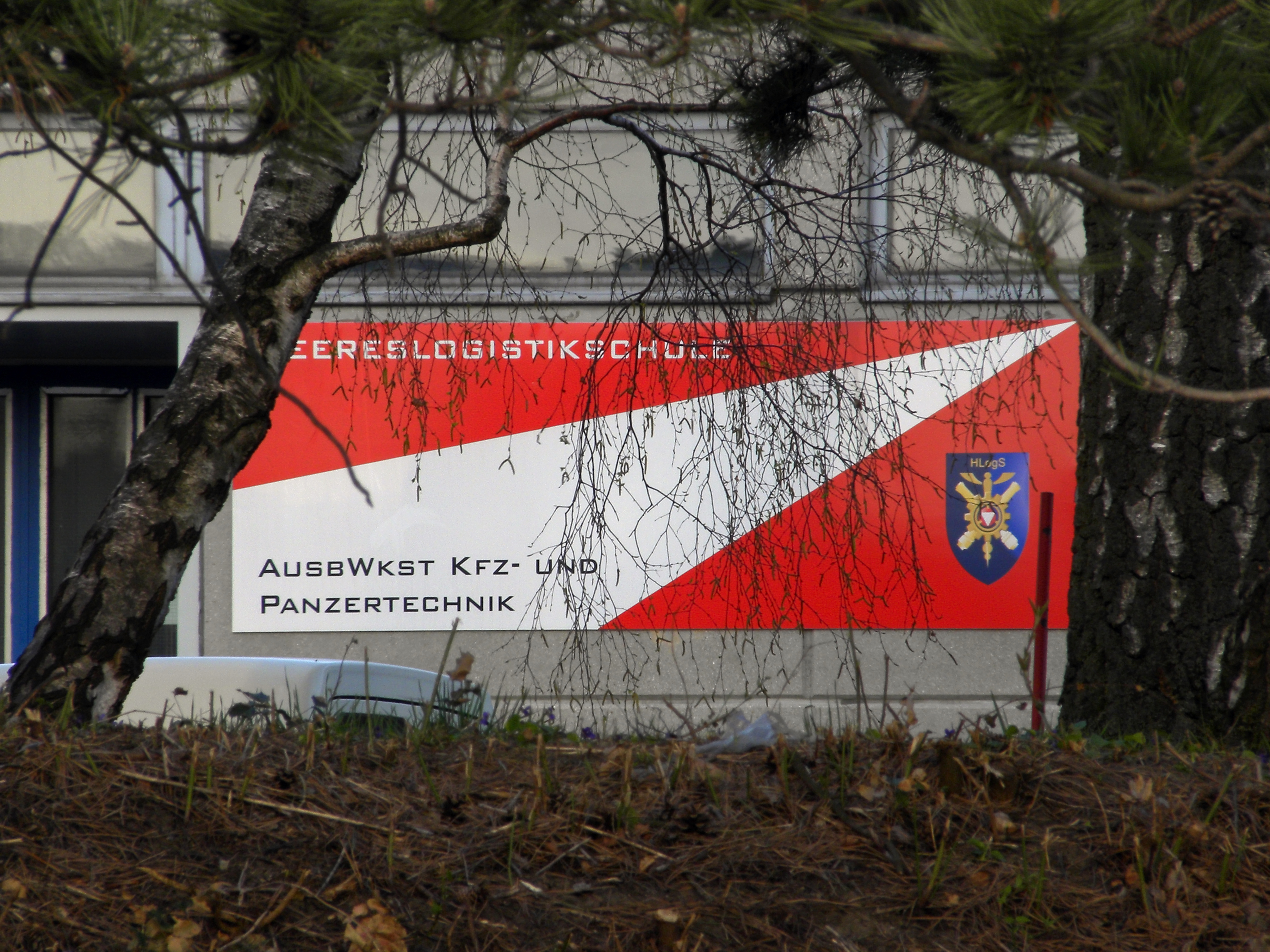 Das ehemalige Philips-Zeiss-Werk wird vom Bundesheer als Ausbildungswerkstätte für KFZ- und Panzertechnik der Heereslogistikschule verwendet.